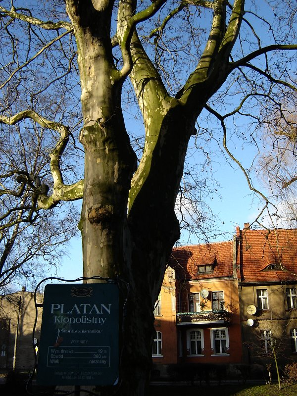 Platan klonolistny we Wschowie (2005-01-19).